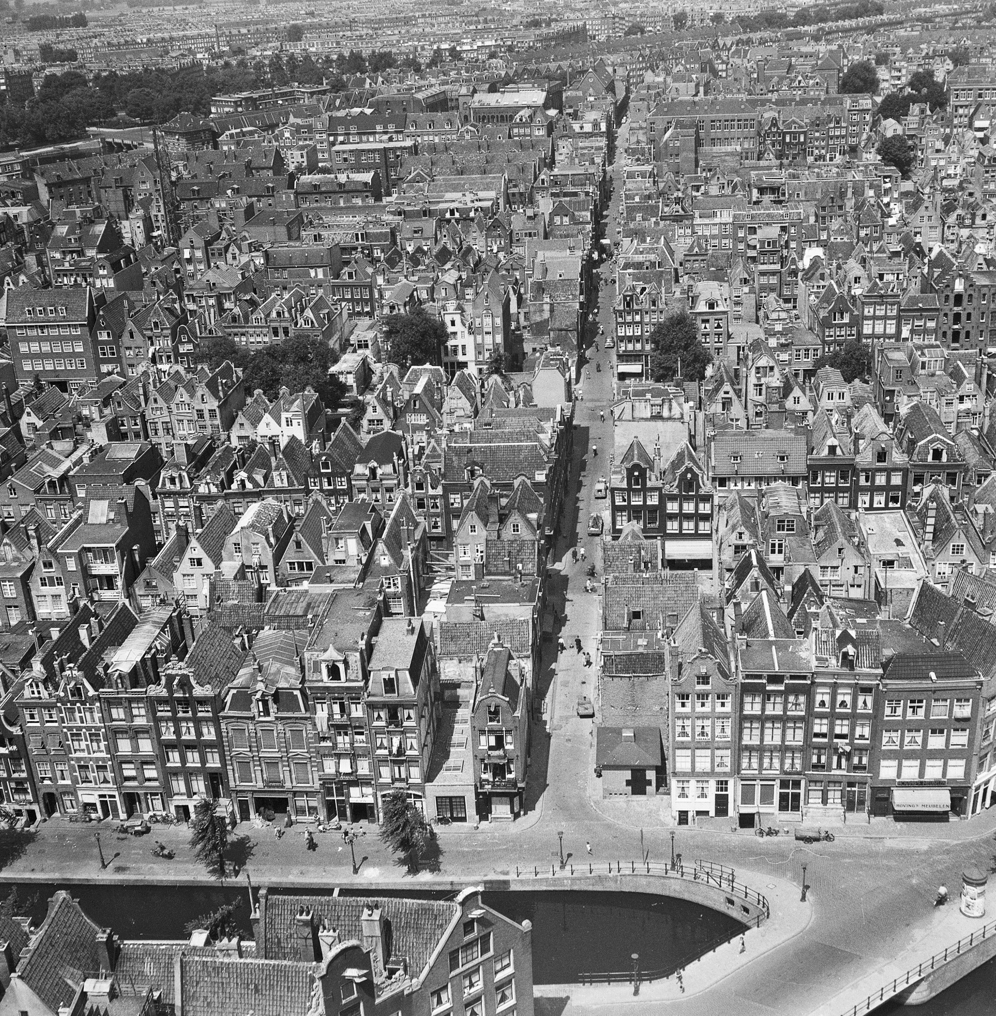 Plattegronden en overzichten: overzicht van af Westertoren naar het noord-westen